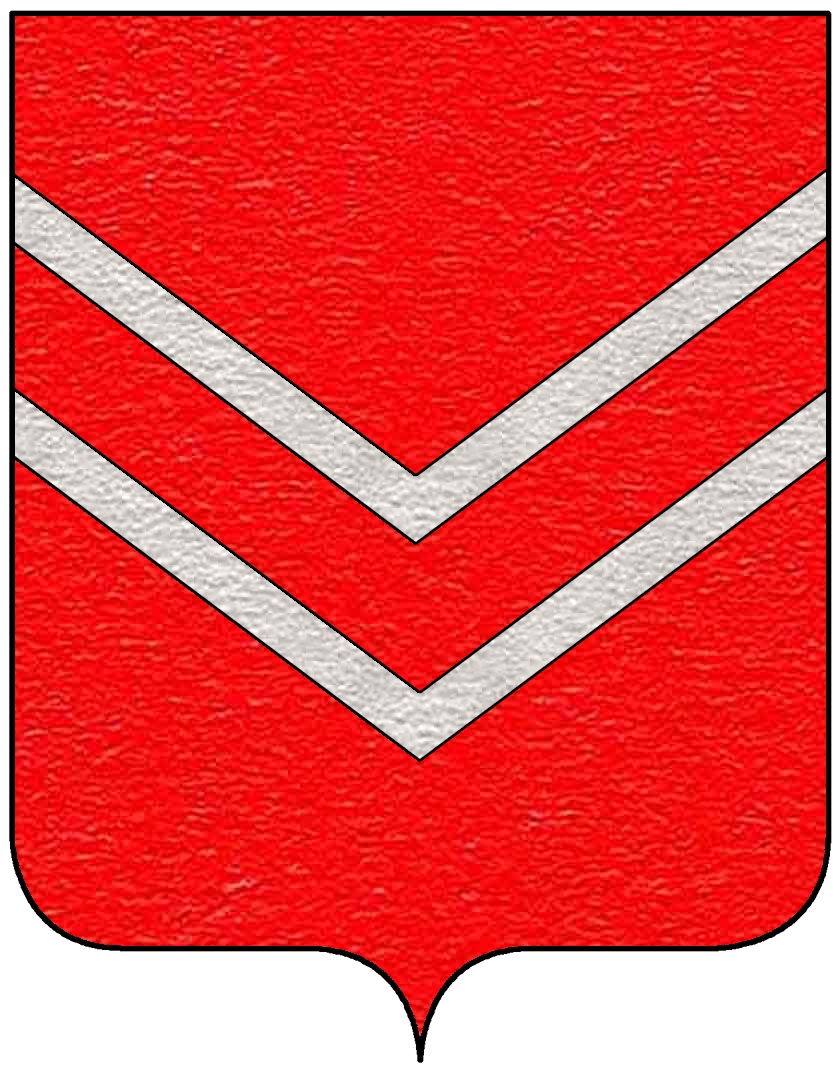 Stemma della famiglia Laderchi